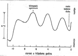 Холоцен или постпеистоцен обухвата раздобље од задњих 10.000 година